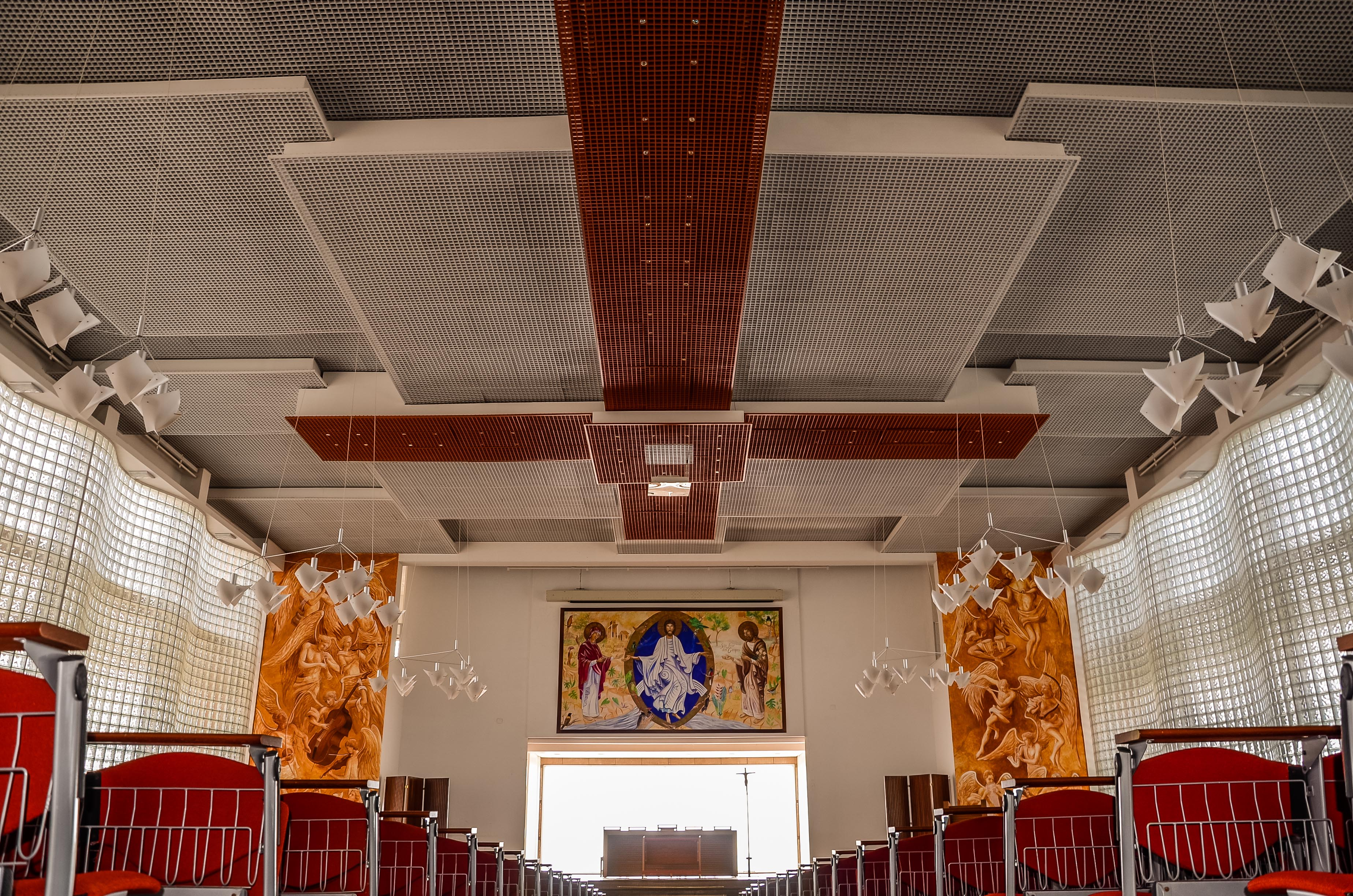 Capela Ecumênica da Fundação Valeparaibana de Ensino (FVE) e Universidade do Vale do Paraíba (Univap), localizada em São José dos Campos/SP.